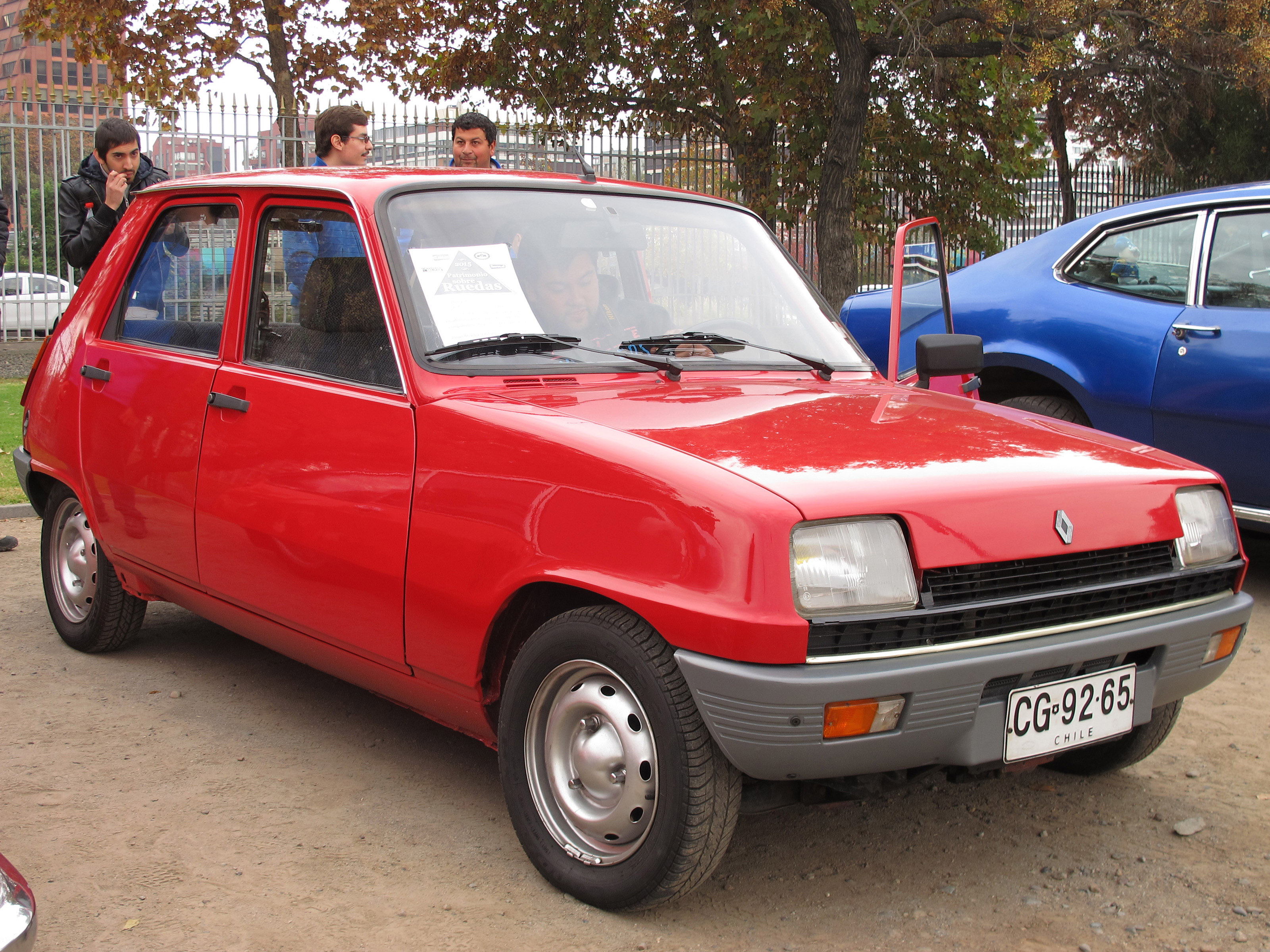 Renault 5 1981